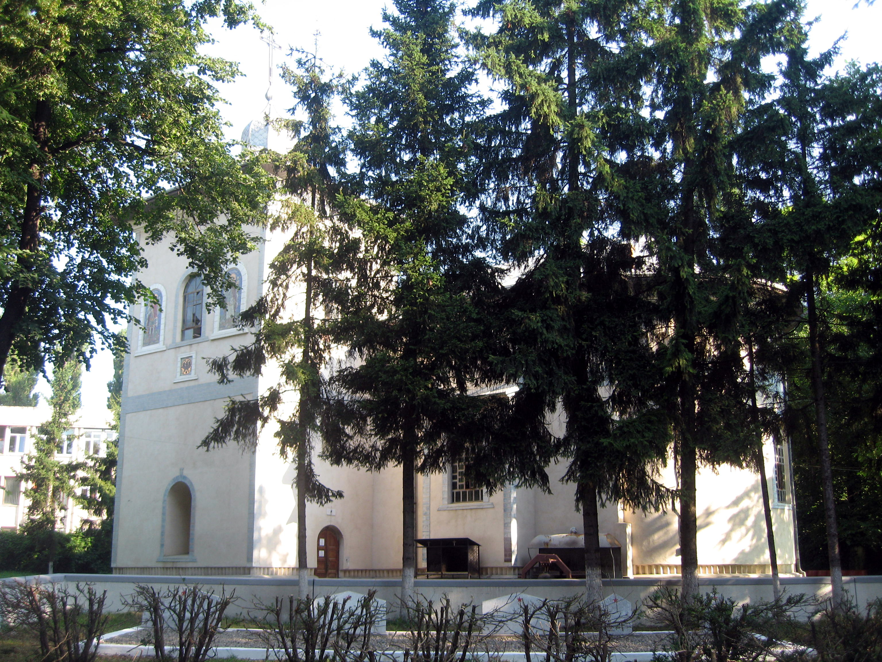 Biserica Sf. Voievozi din Pascani